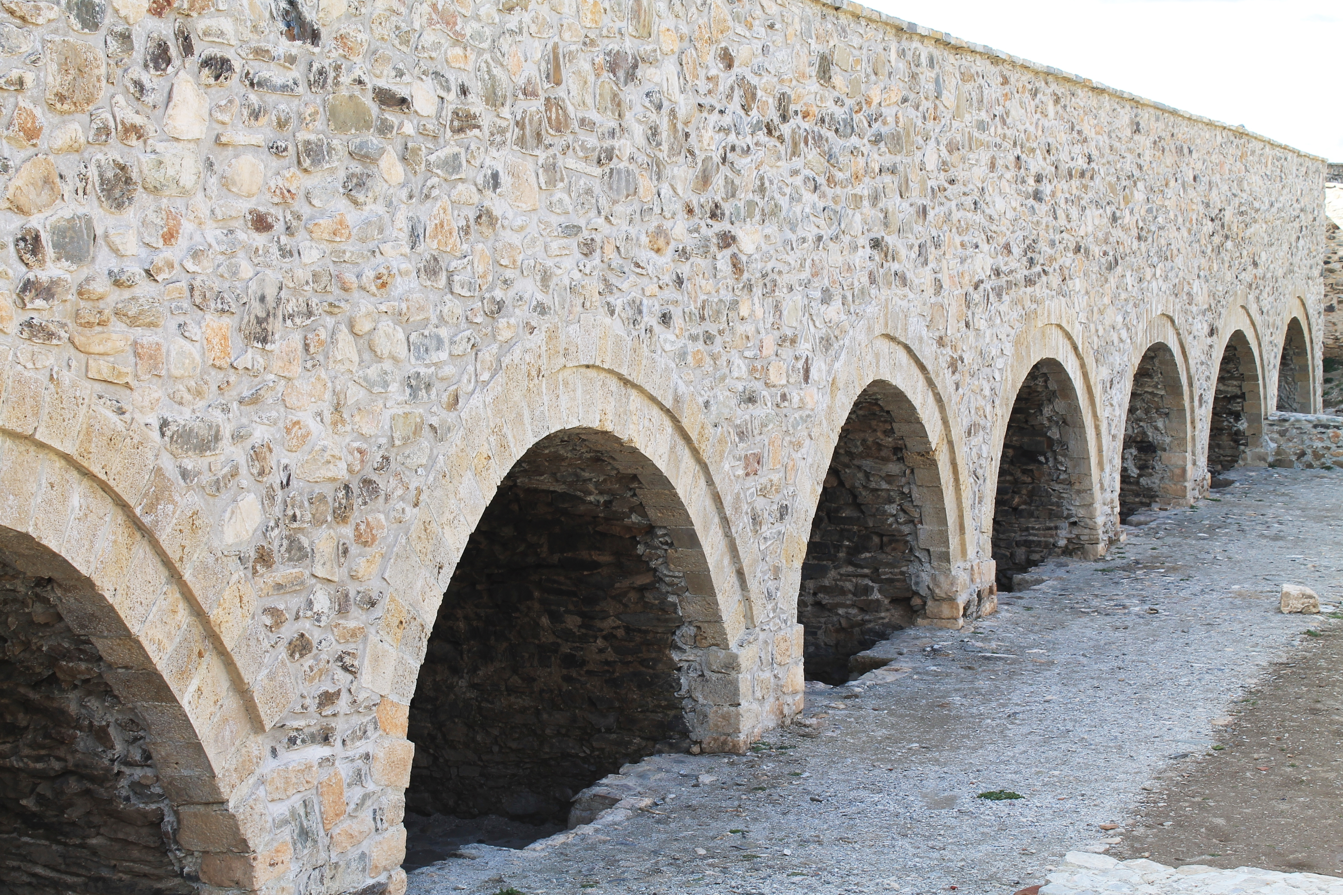 Kalaja e Prizrenit